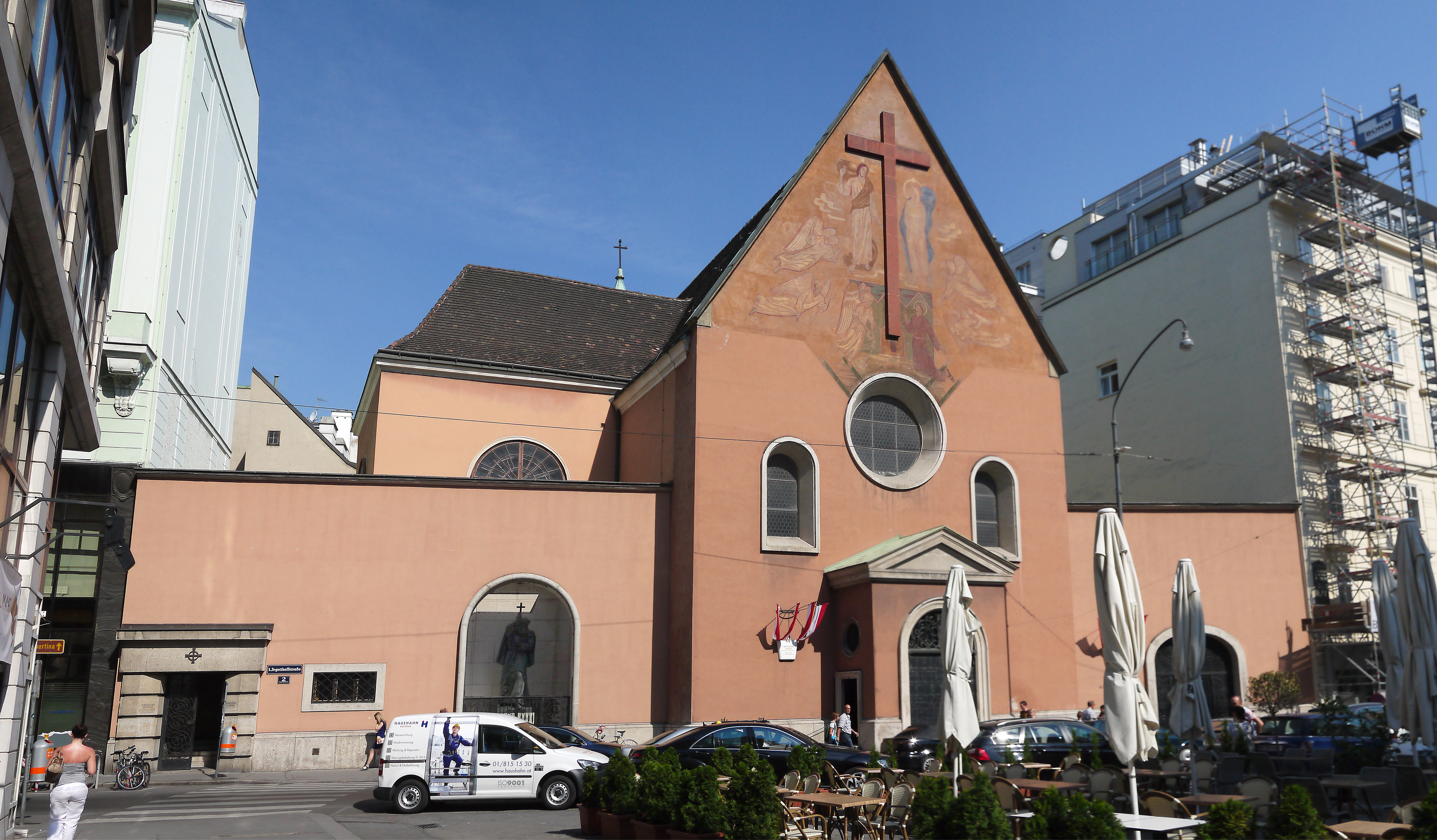 Kapuzinerkirche hl. Maria zu den Engeln mit Kloster und Kapuzinergruft